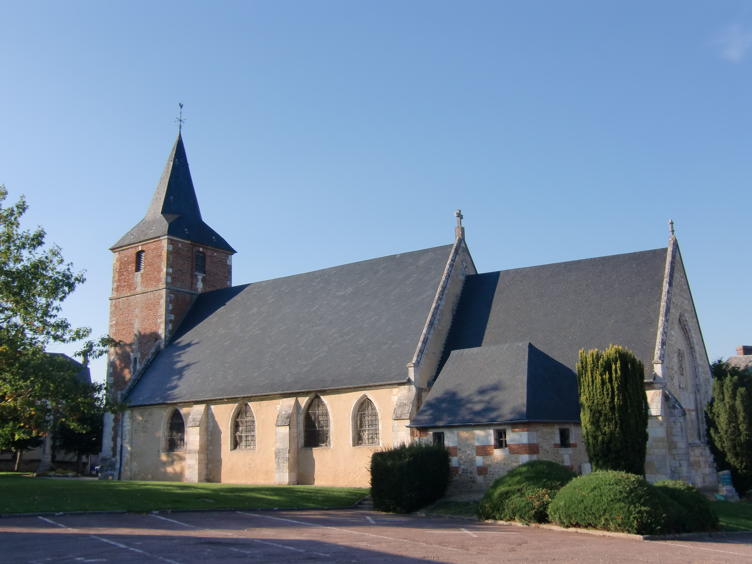 église de Conteville (Eure, Normandie, France)